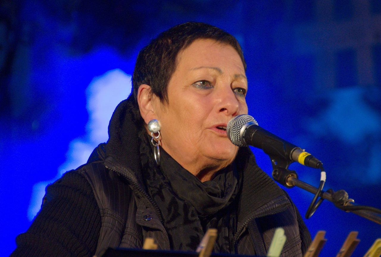 Image prise à La Nuit de la Photo de Vannes, le 7 juillet 2012, pendant un concert de Anne.